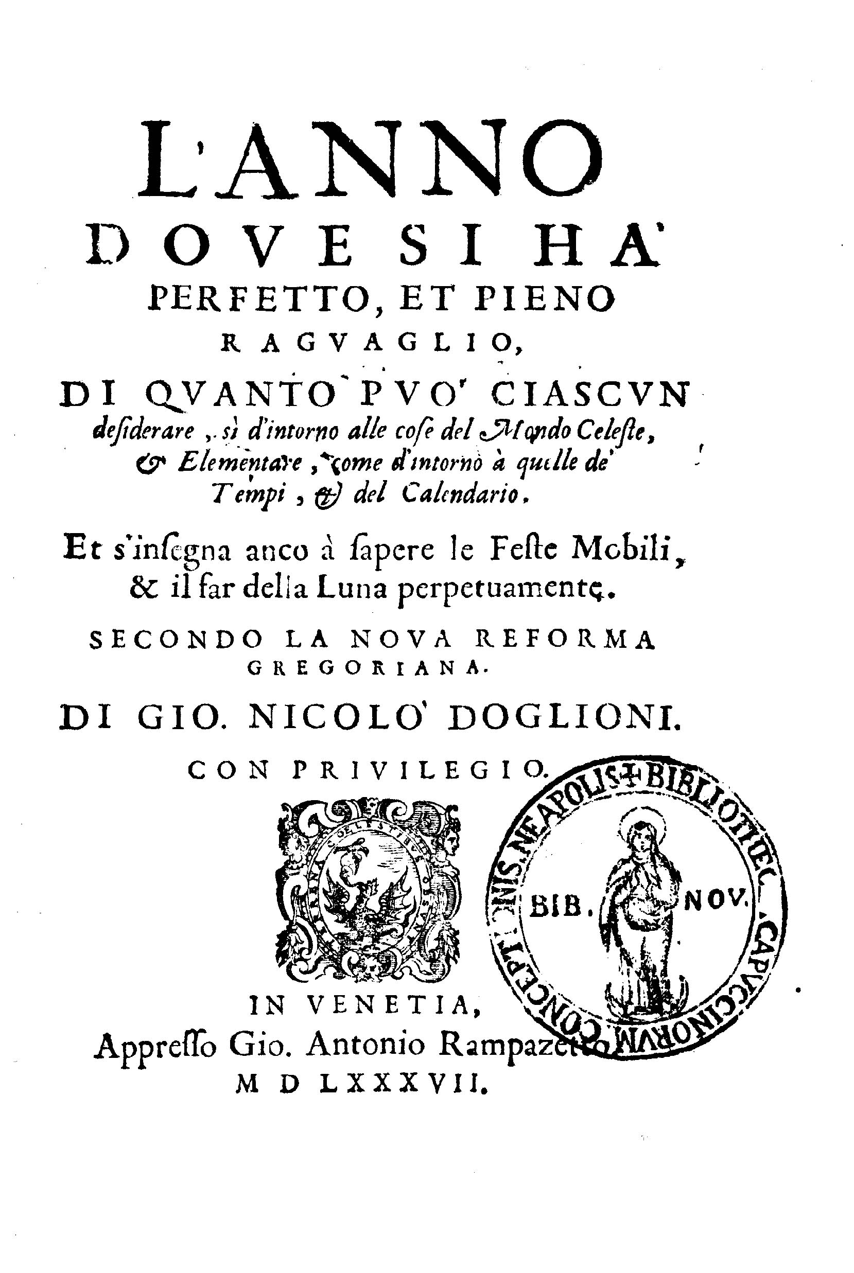 L' anno doue si ha perfetto, et pieno raguaglio, di quanto può ciascun desiderare, sì d'intorno alle cose del mondo celeste, & elementare, come d'intorno à quelle de' tempi, & del calendario. Et s'insegna anco à sapere le feste mobili, & il far della luna perpetuamente. Secondo la noua reforma gregoriana. Di Gio. Nicolò Doglioni. - In Venetia : appresso Gio. Antonio Rampazetto, 1587 (In Venetia : appresso Gio. Antonio Rampazetto, 1587). - [4], 49, [3] c. : ill. ; 4º .